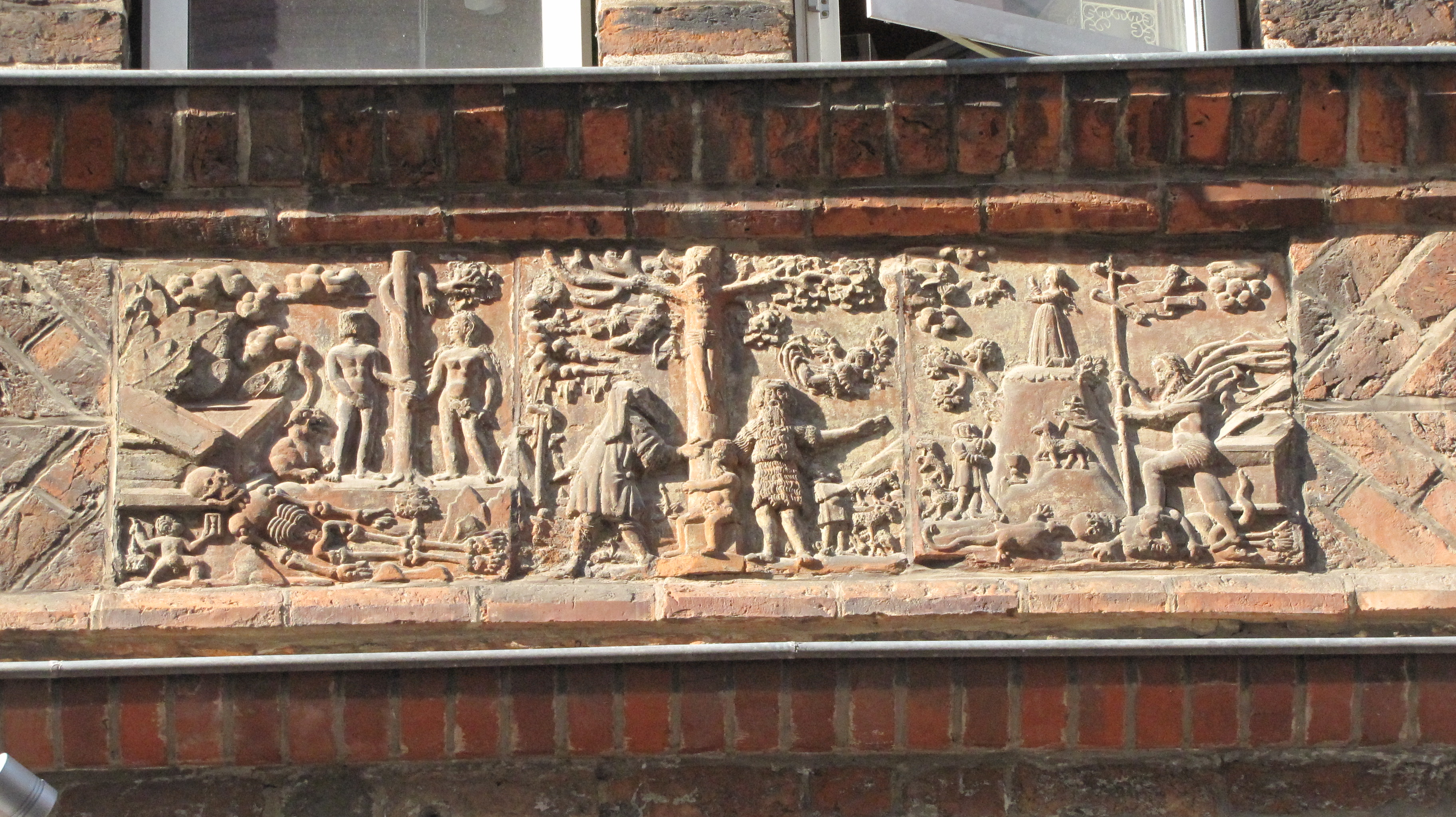 Law and grace triptych, Fleischhauerstr., Lübeck